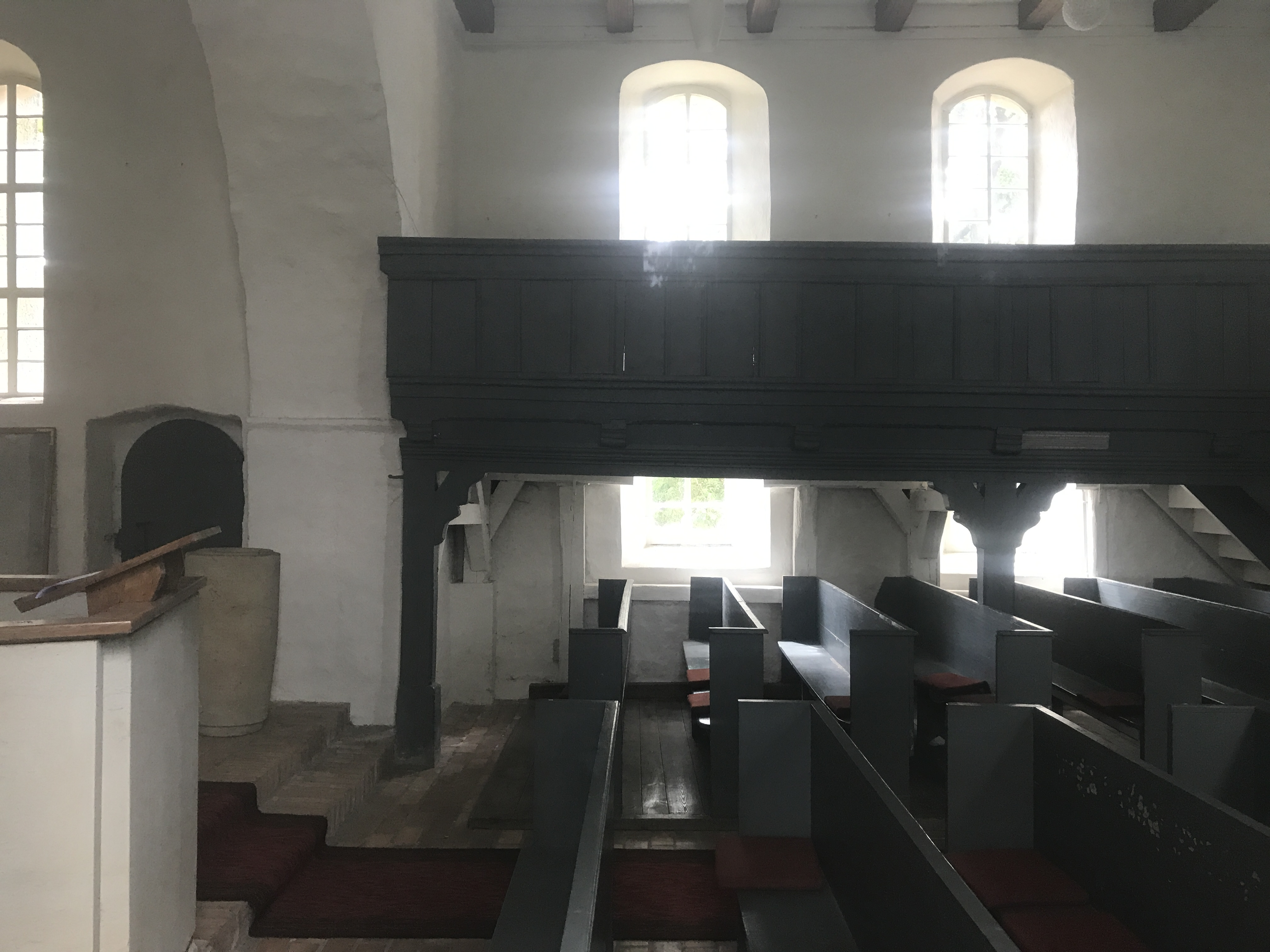 Die Dorfkirche Groß Ziescht ist eine Feldsteinkirche aus der ersten Hälfte des 13. Jahrhunderts in Baruth/Mark im Land Brandenburg.